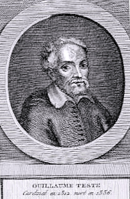 Cardinal Guillaume Teste